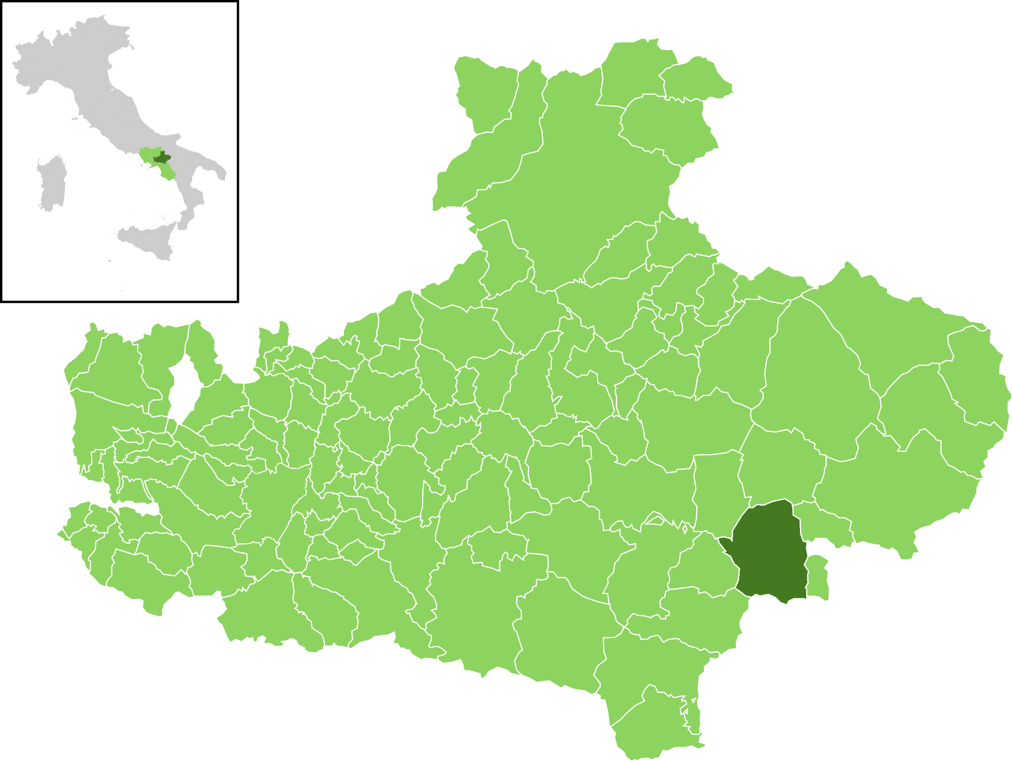 Il comune all'interno della provincia di Avellino